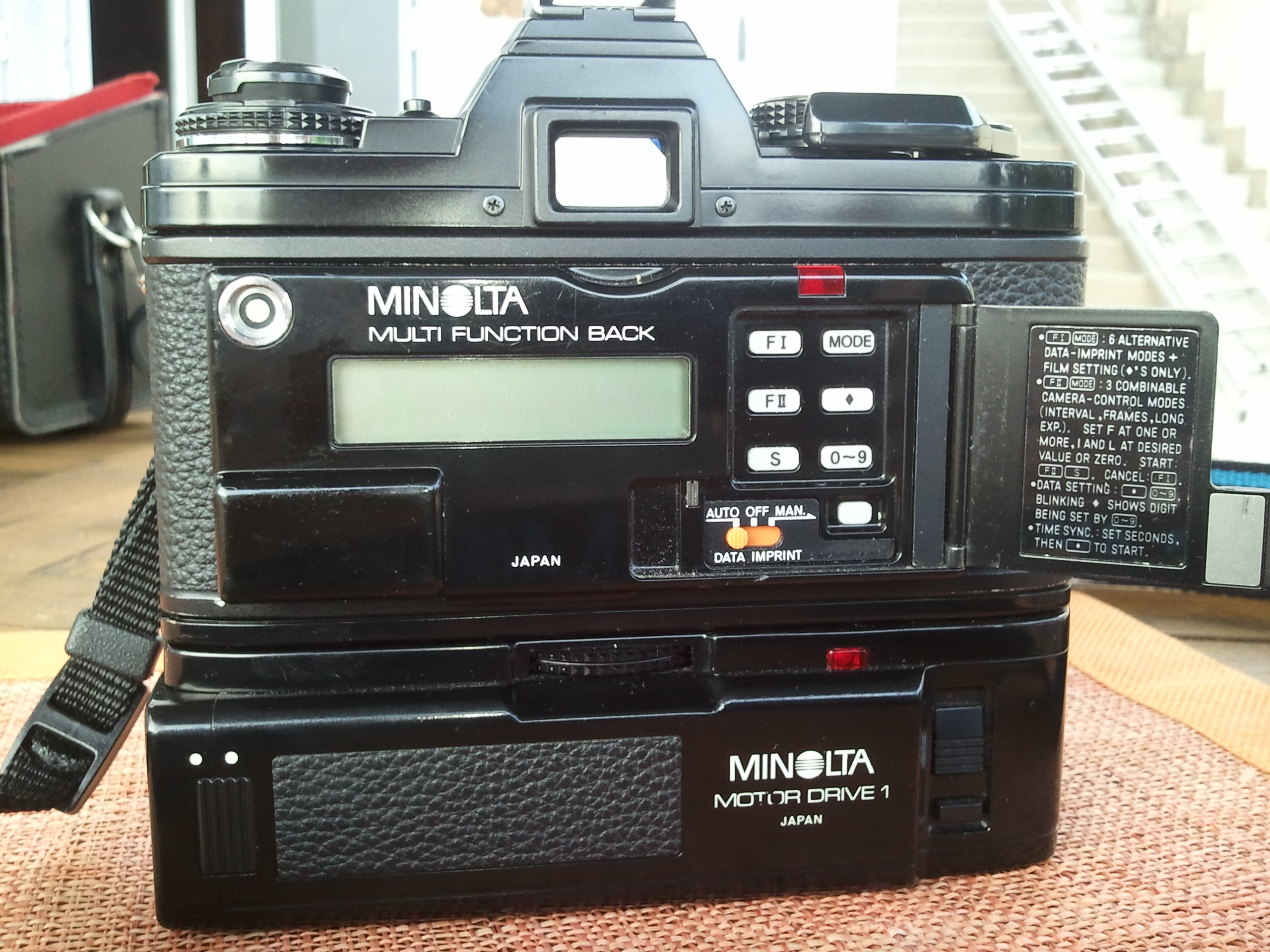 dos dateur, trappe de commande ouverte